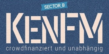 Logo von KenFM